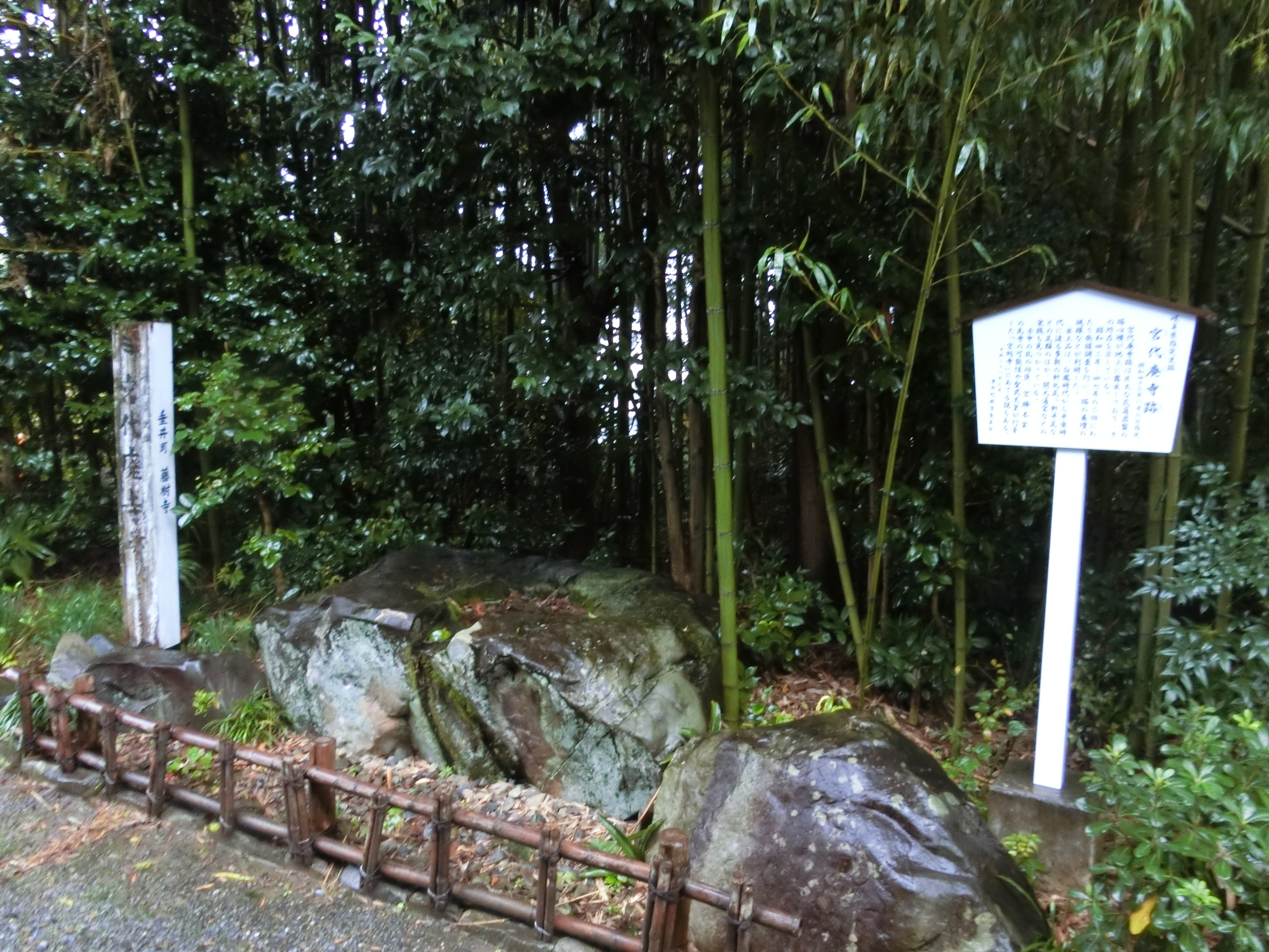 垂井町にある史跡、宮代廃寺。その塔礎石。（藤樹寺境内）